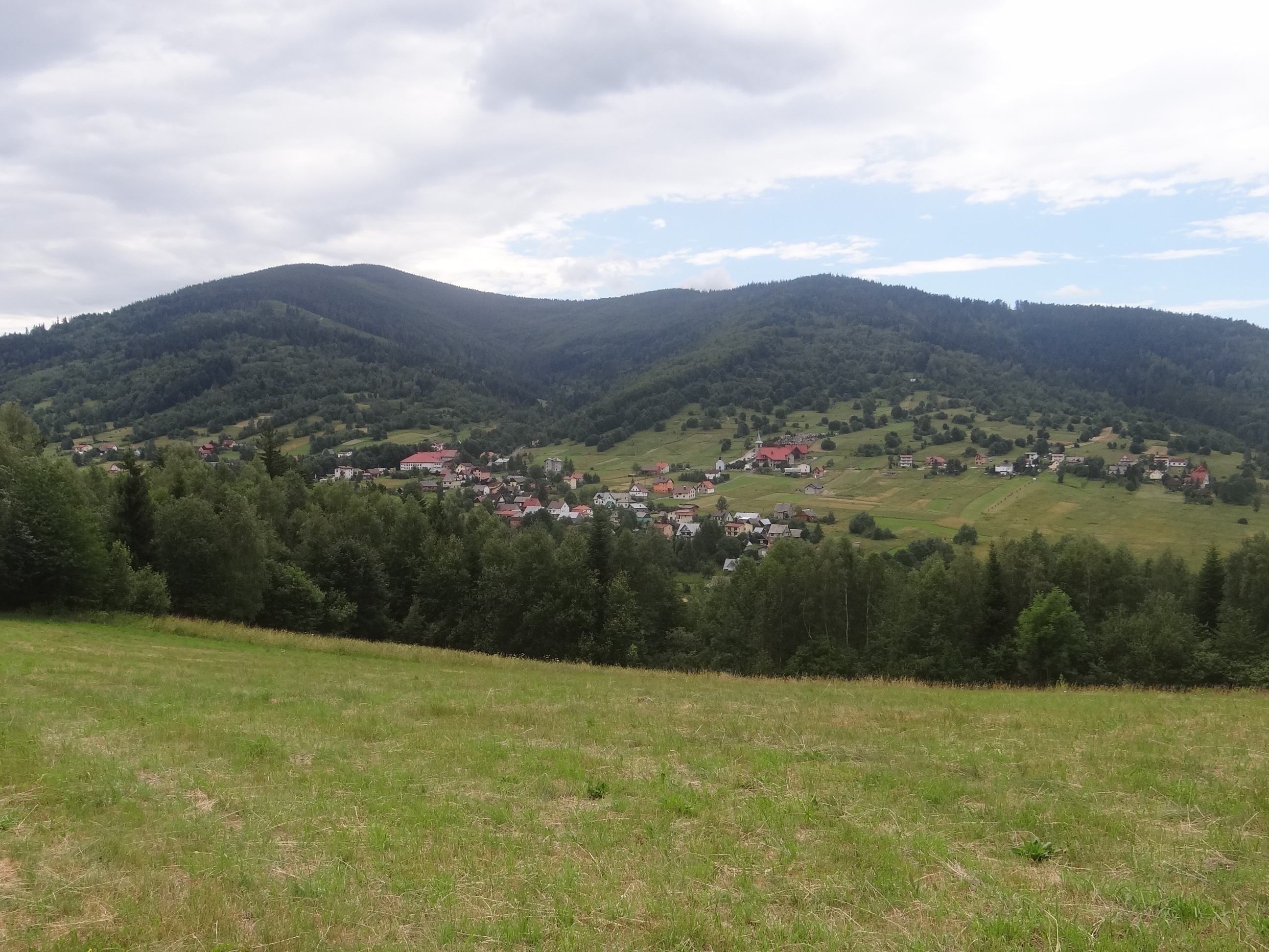 Widok na Kotarnicę (po lewej) i łazy (po prawej). Poniżej Sopotnia Wielka